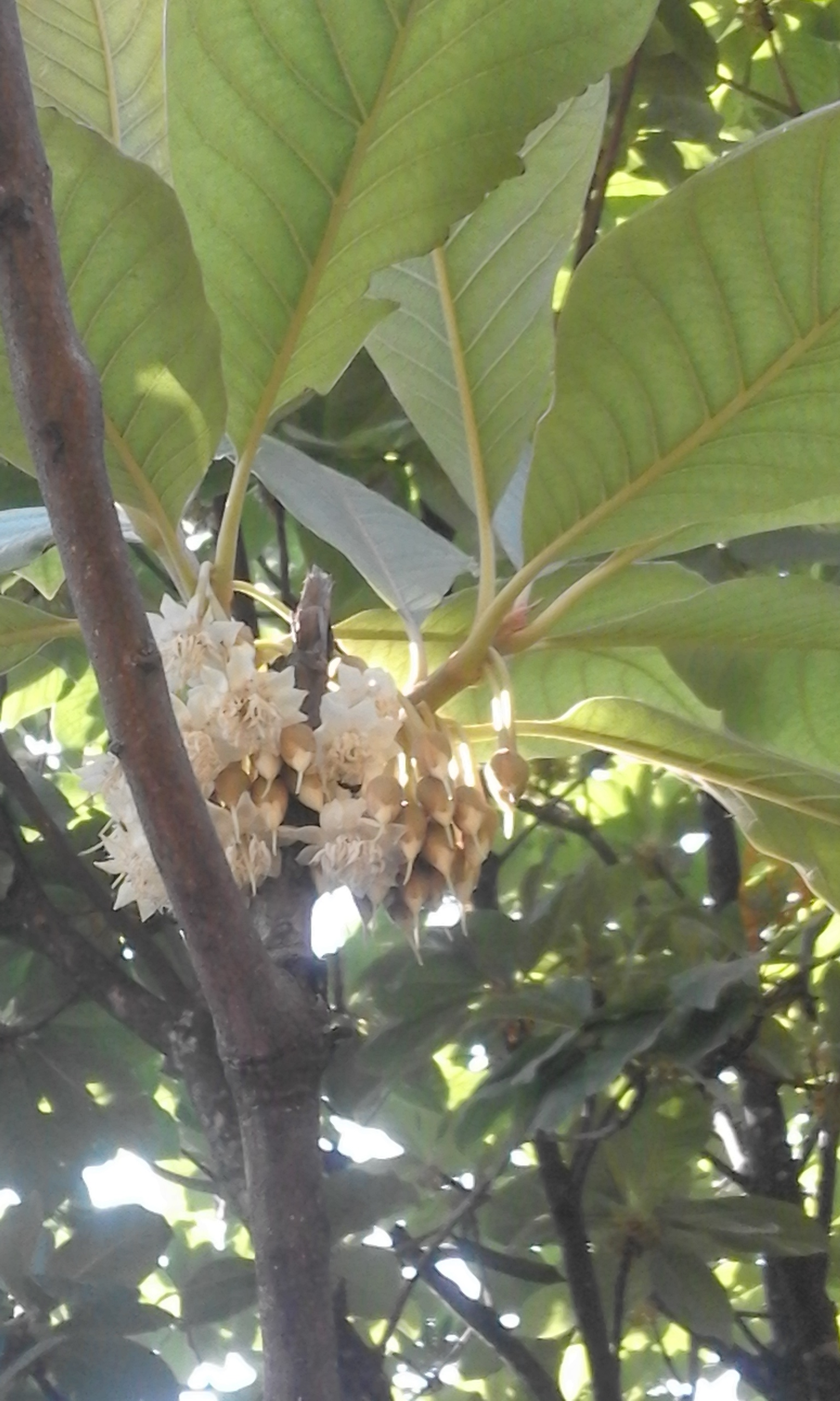 नेपाली: चिउरीको फूल, दार्चुला ।